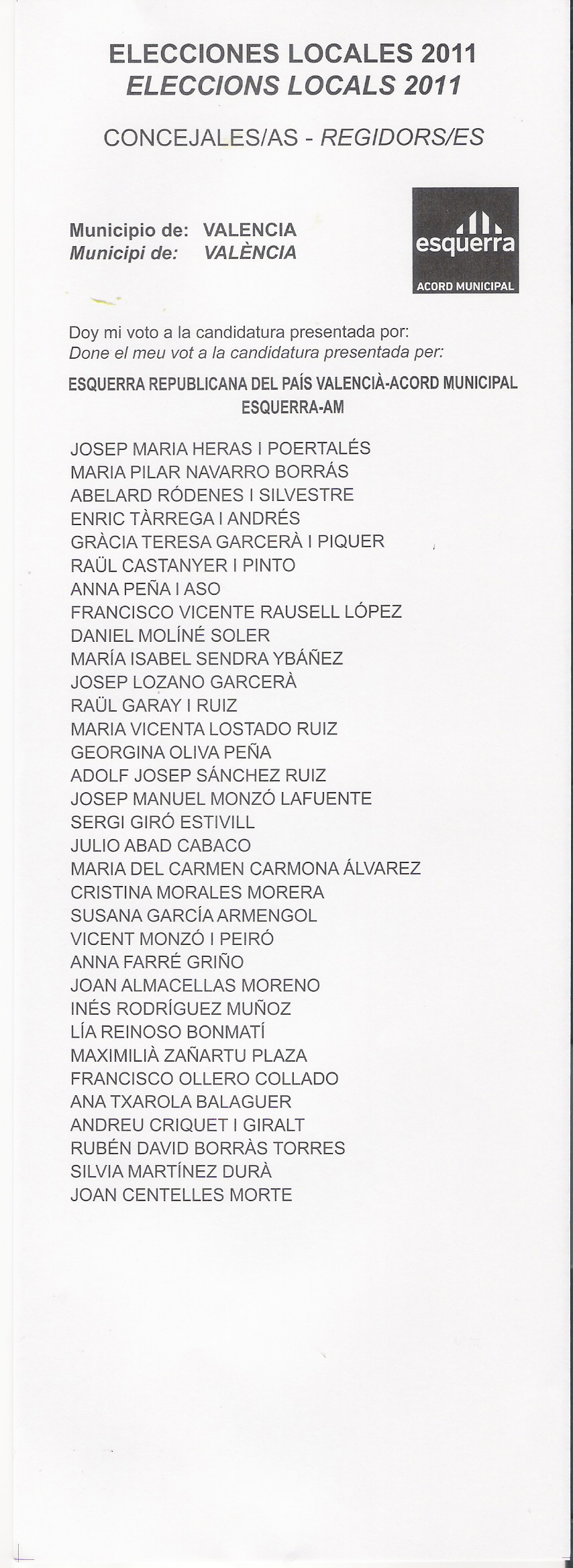 Papeleta electoral de Esquerra Republicana del País Valencià para las elecciones municipales del 22 de mayo de 2011 en el municipio de Valencia.